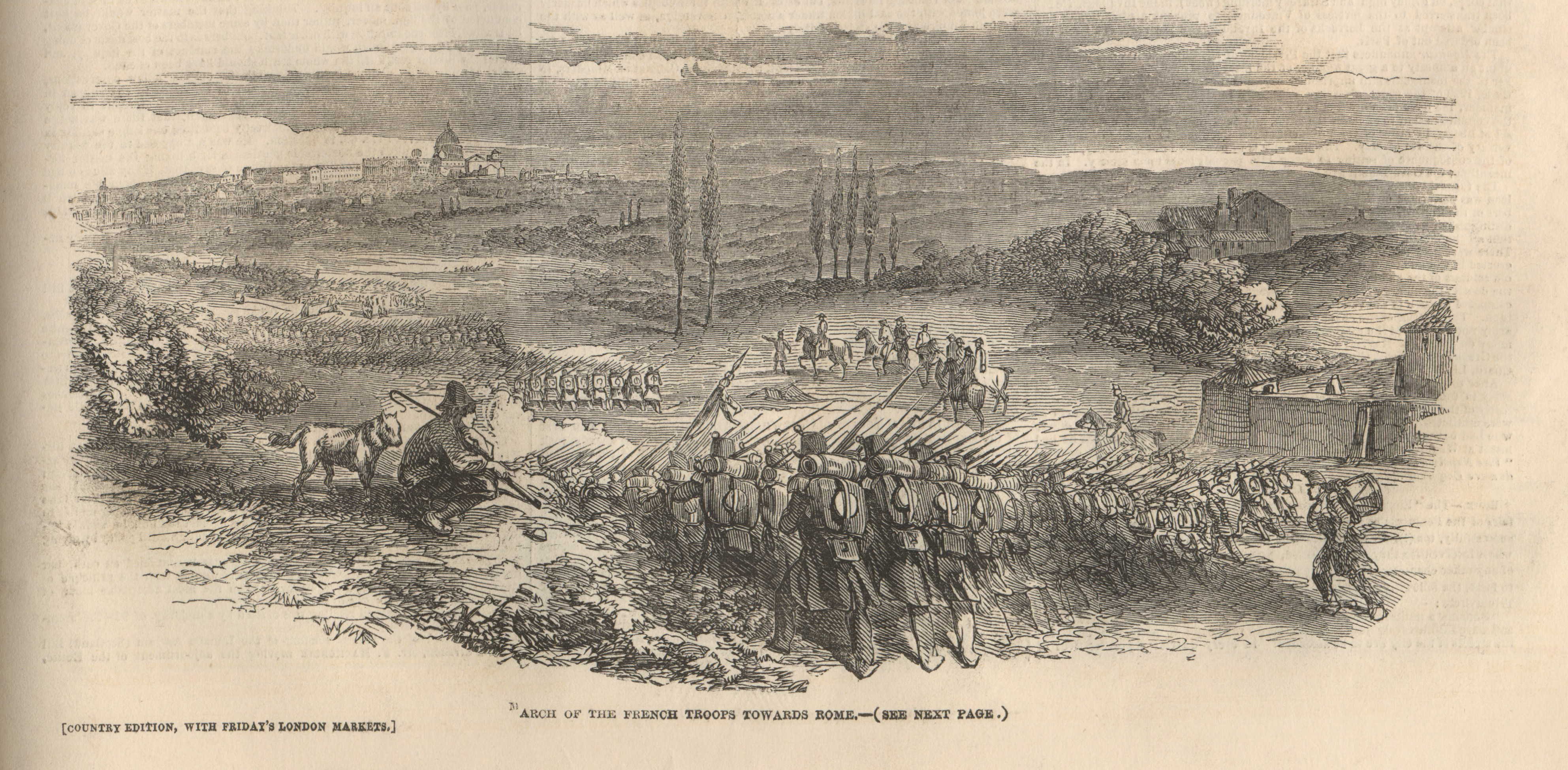 March of the French Troops towards Rome. Illustration publiée dans The Illustrated London News, n° 370, vol. XIV, 12 mai 1849.